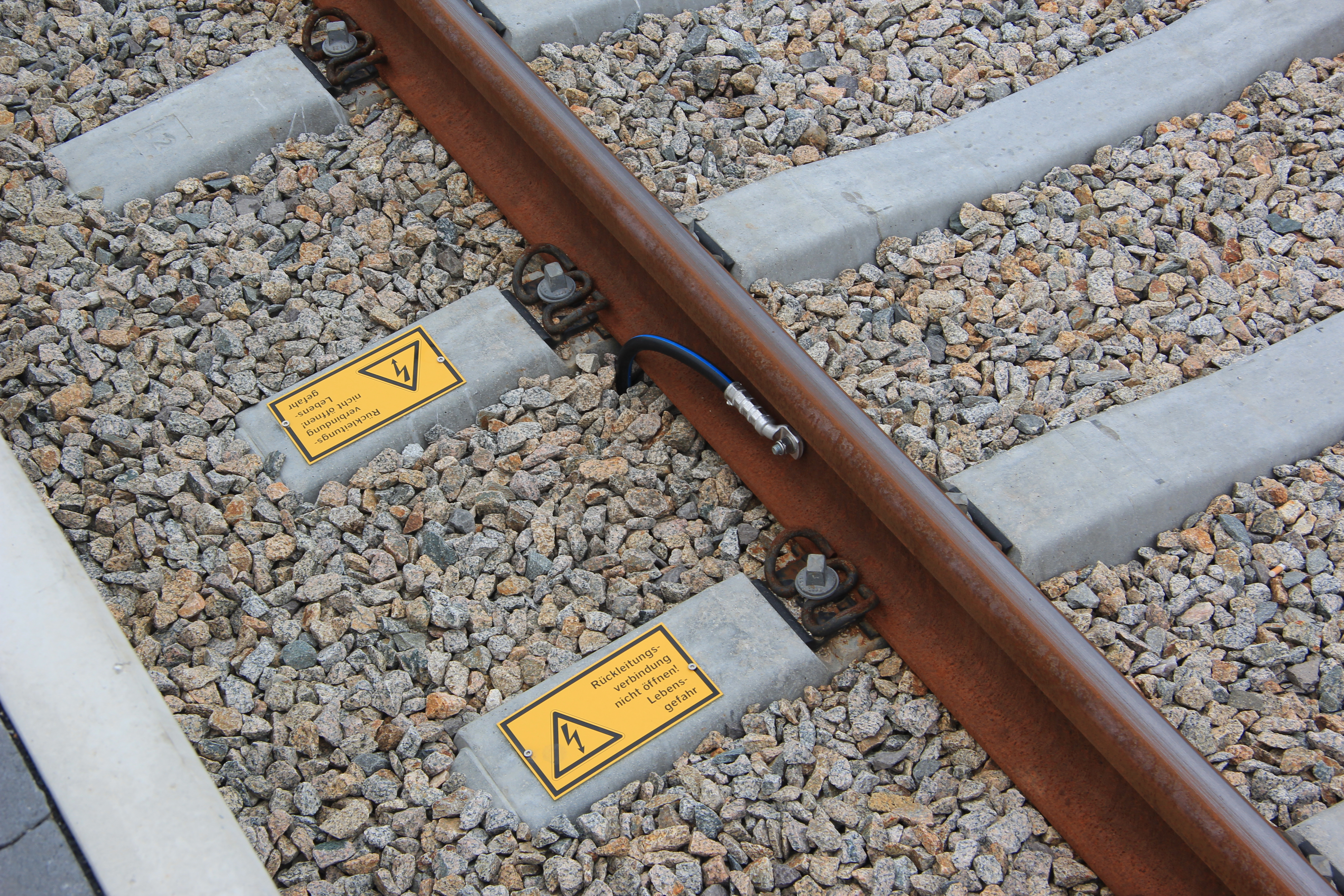 Bahnerdung mittels Aluminium-Leitung am Wiener Hauptbahnhof